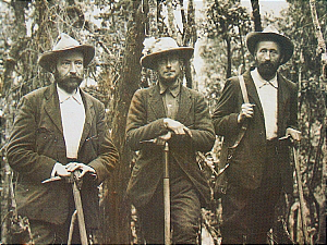 Le Duc des Abruzzes entouré des guides César Ollier et Joseph Petigax en 1906